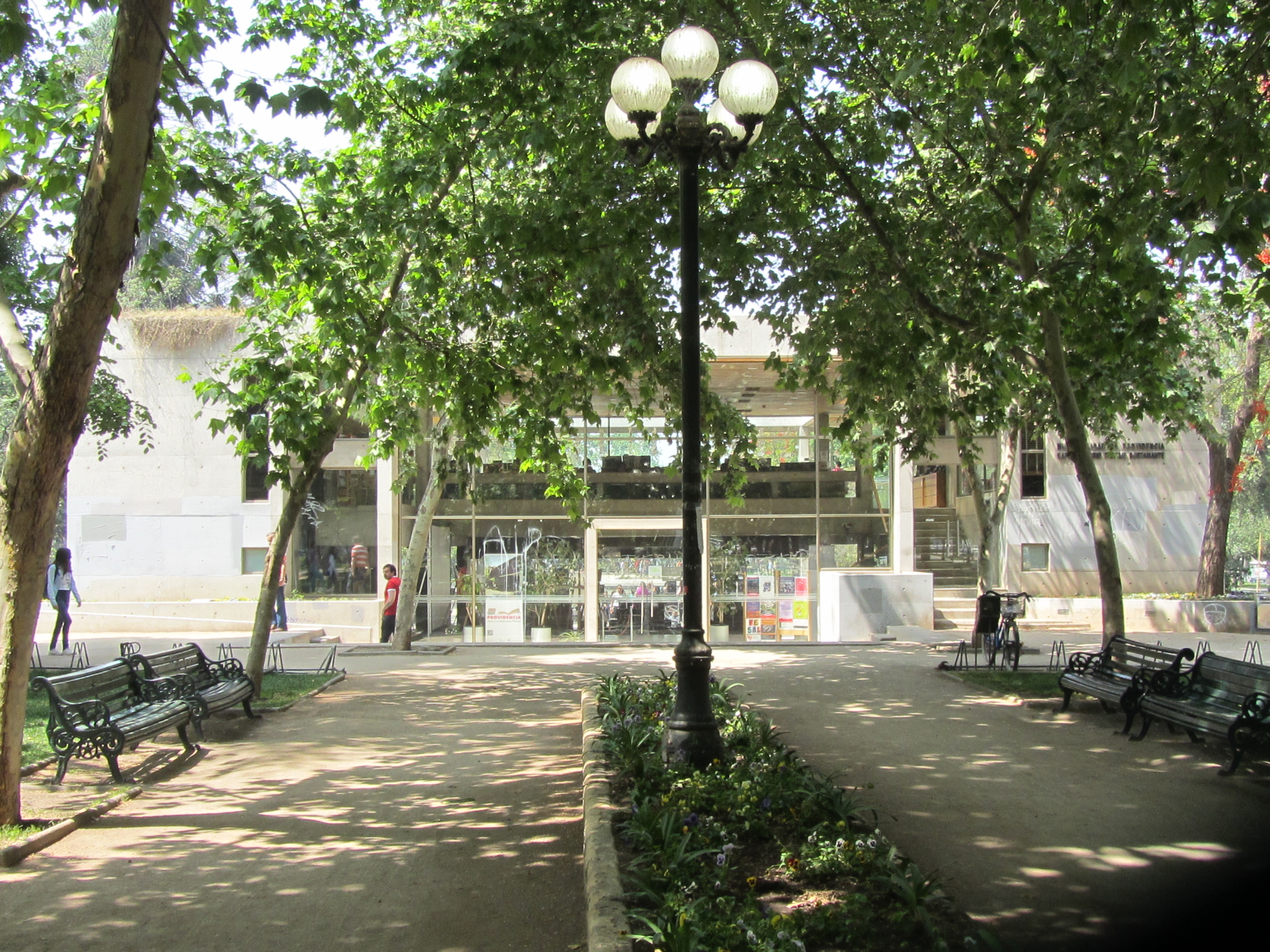 Café literario (biblioteca) en el parque Bustamante, Providencia, Santiago de Chile